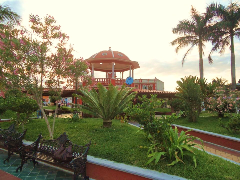 Un bello atardecer.